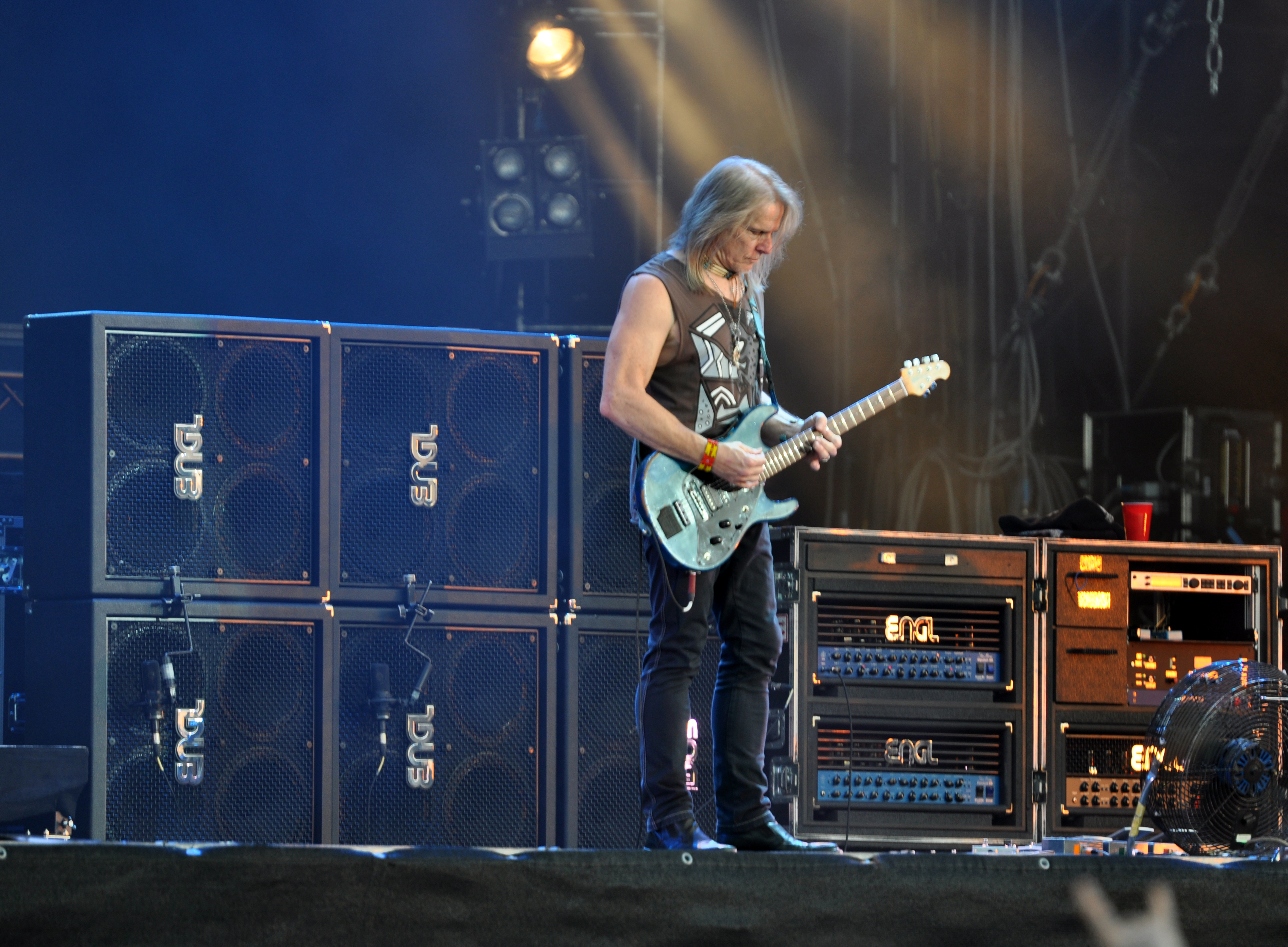 Deep Purple at Wacken Open Air 2013